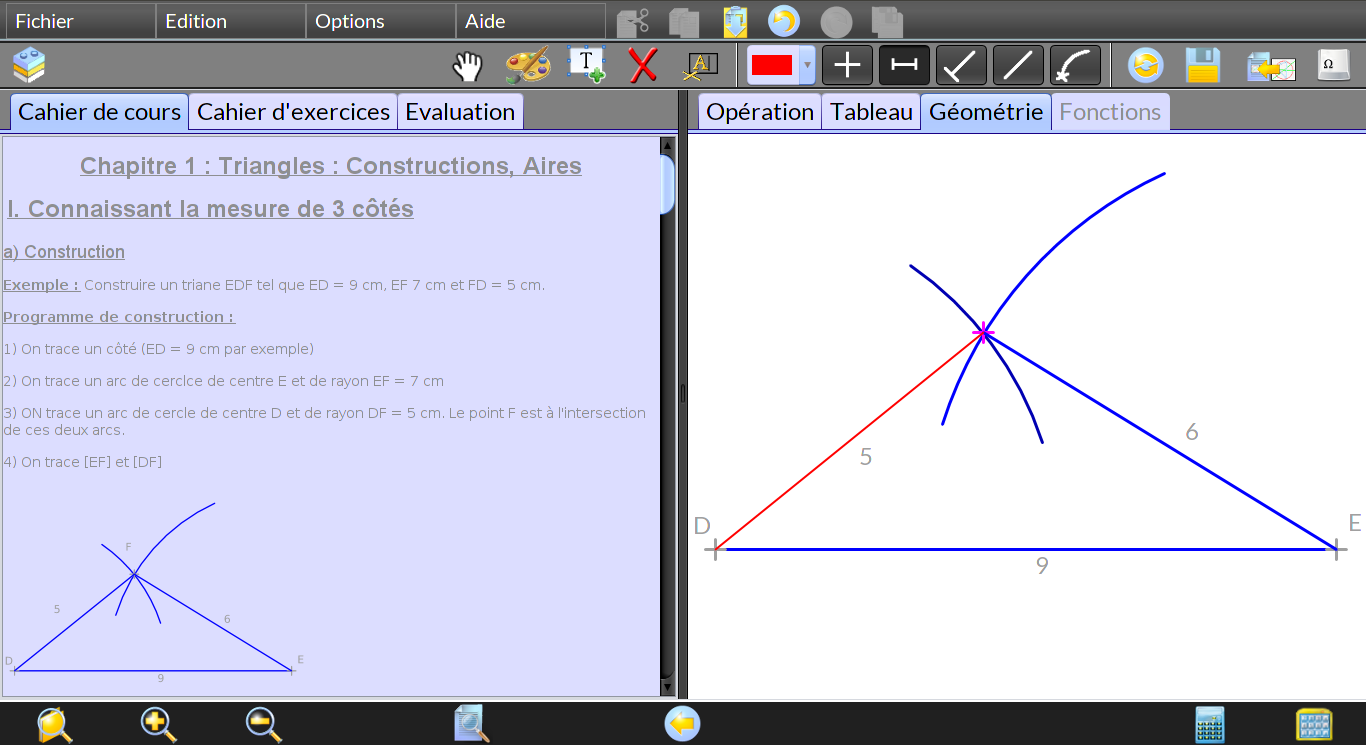 Présentation de l'onglet Géométrie de MathEOS